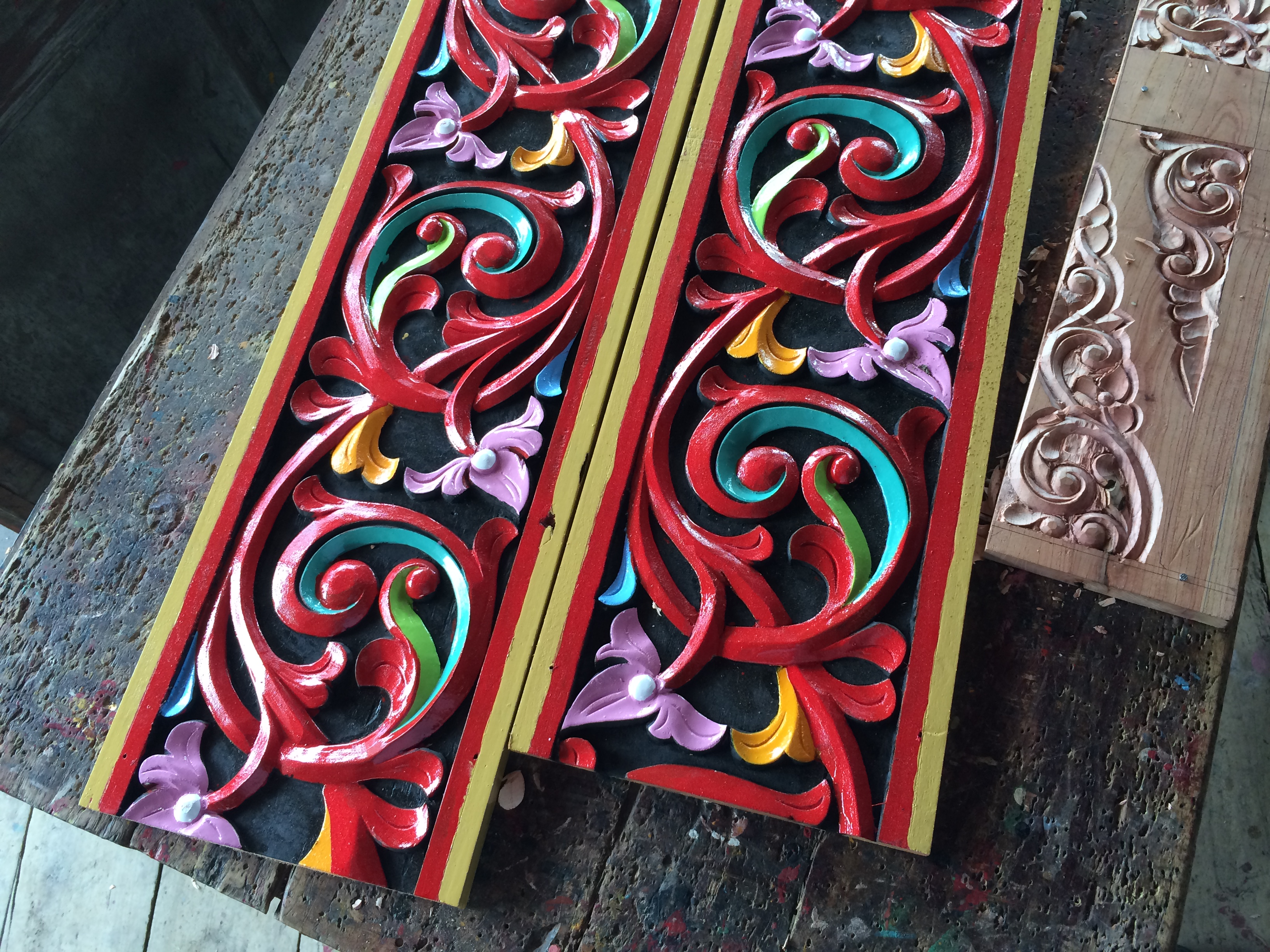 Ukiran Chan Umar